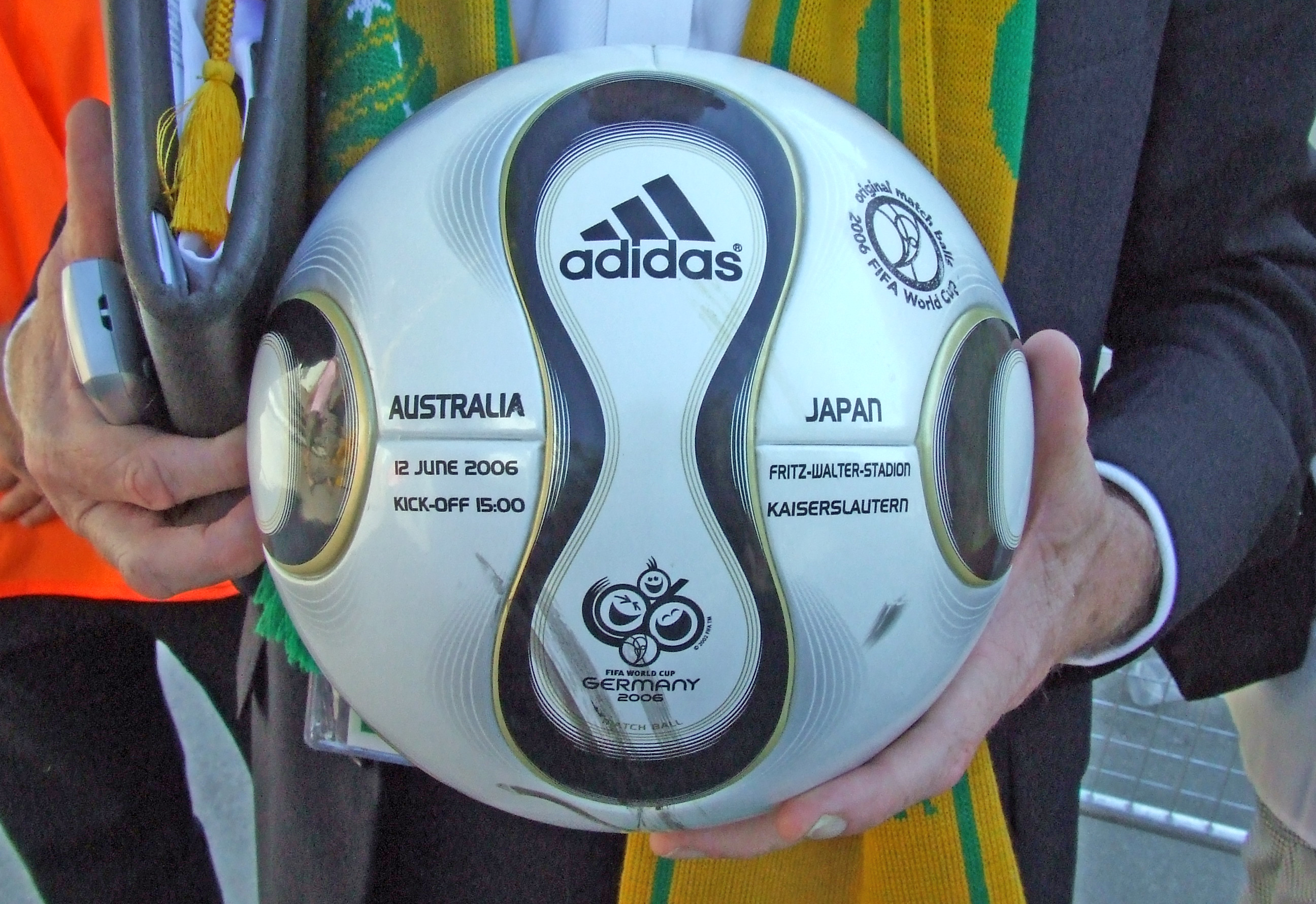 De Ball vum Match Australien - Japan